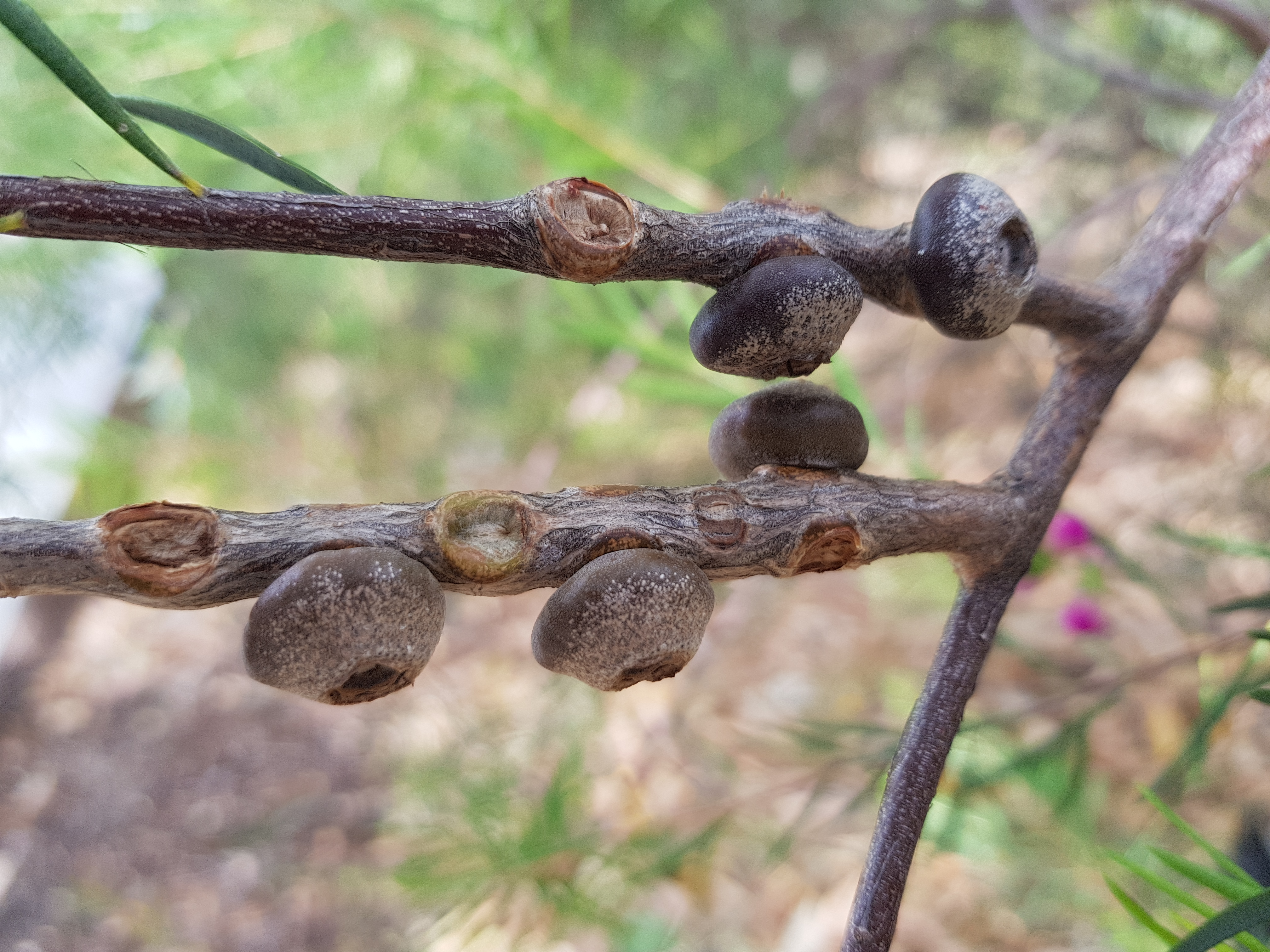 Melaleuca fulgens ssp. steedmanii.